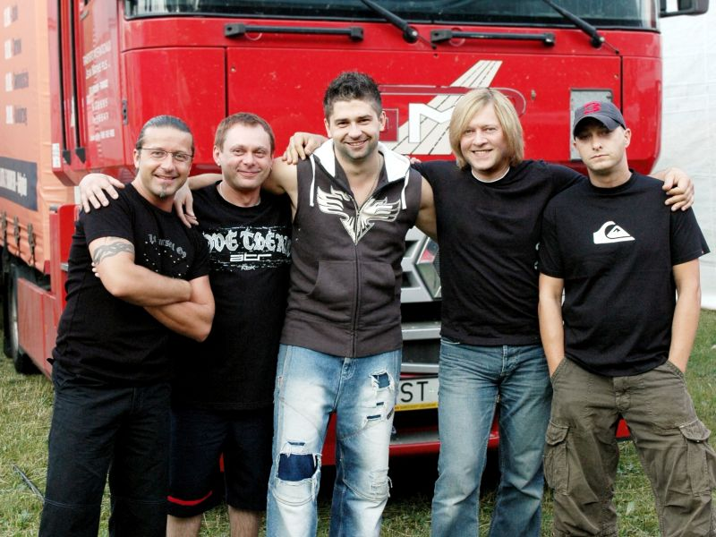 IRA w 2007 r.